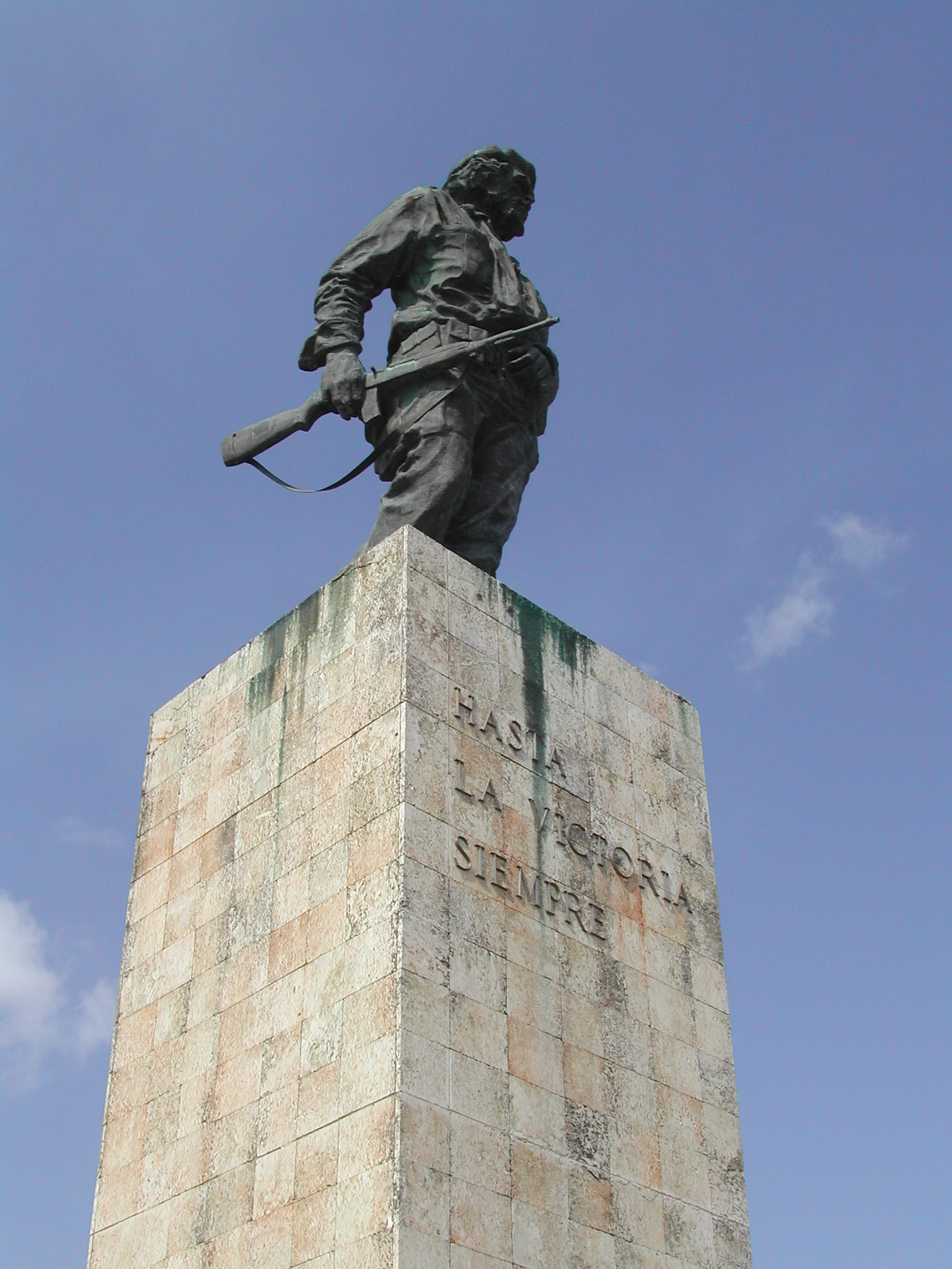 Monument vum Che Guevara zu Kuba